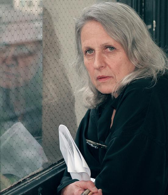 Photo by Nathaniel Paluga